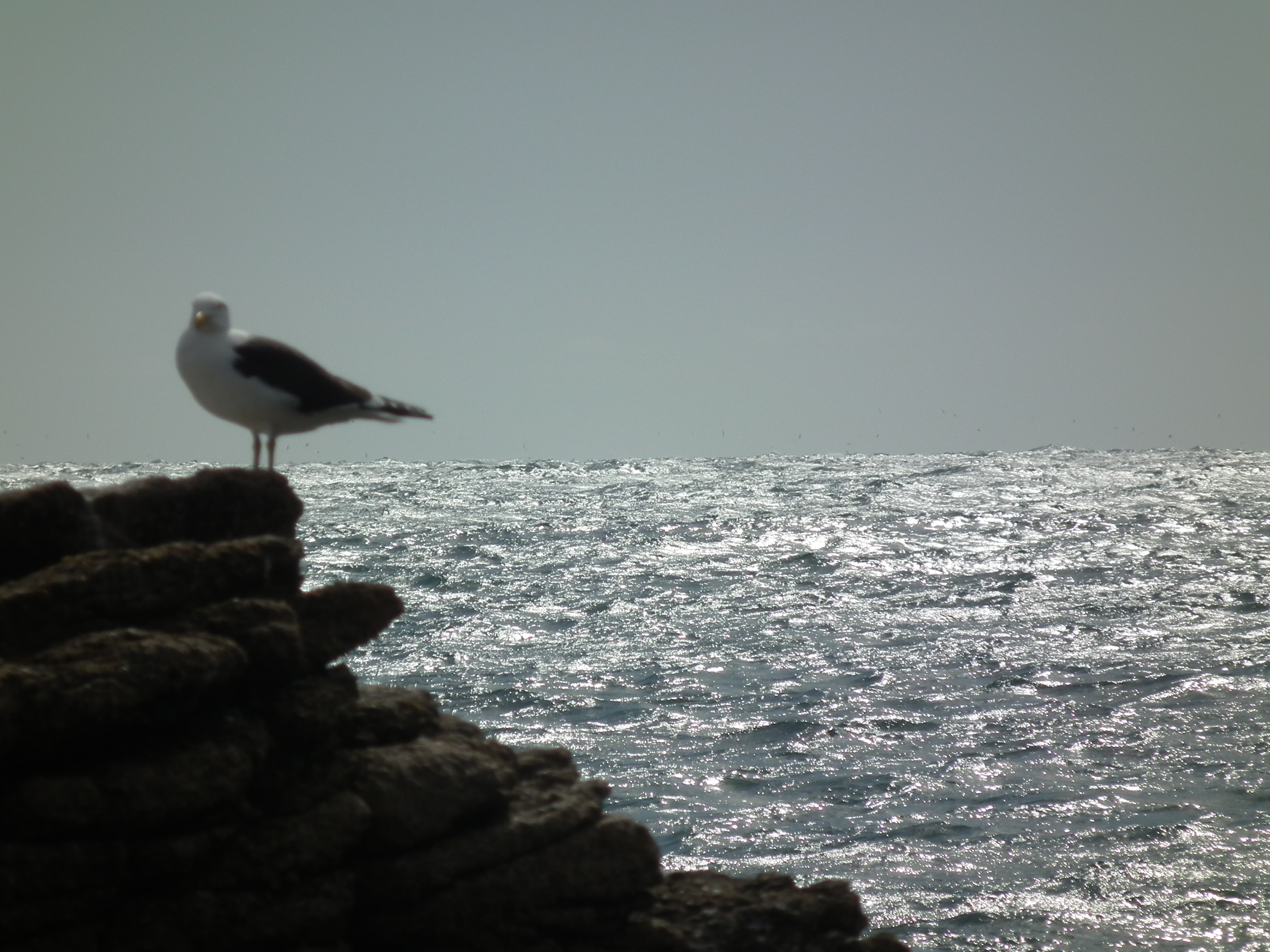 Gaviota austral (Leucophaeus scoresbii) en El Quisco